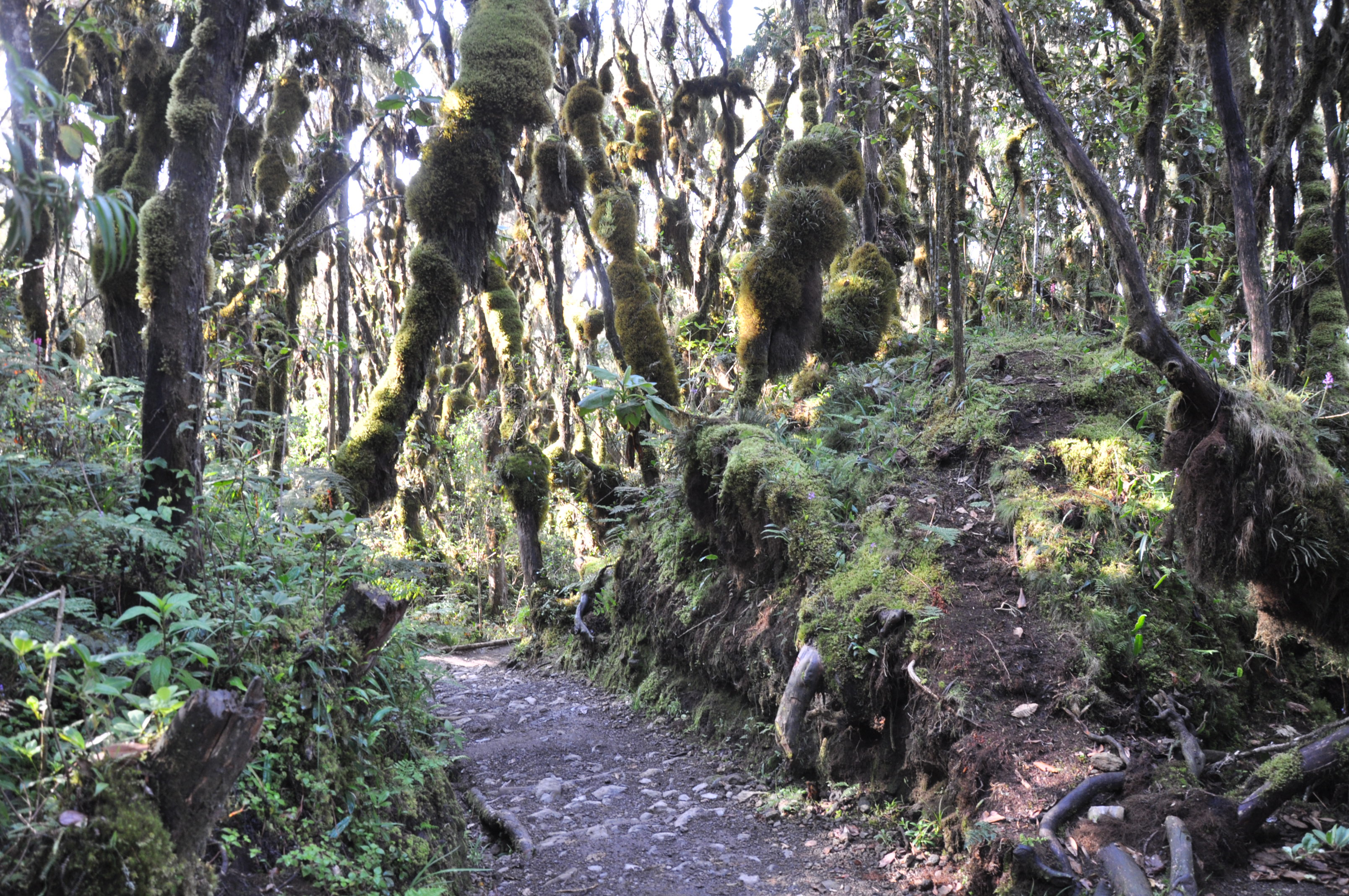 Montane rainforests biome